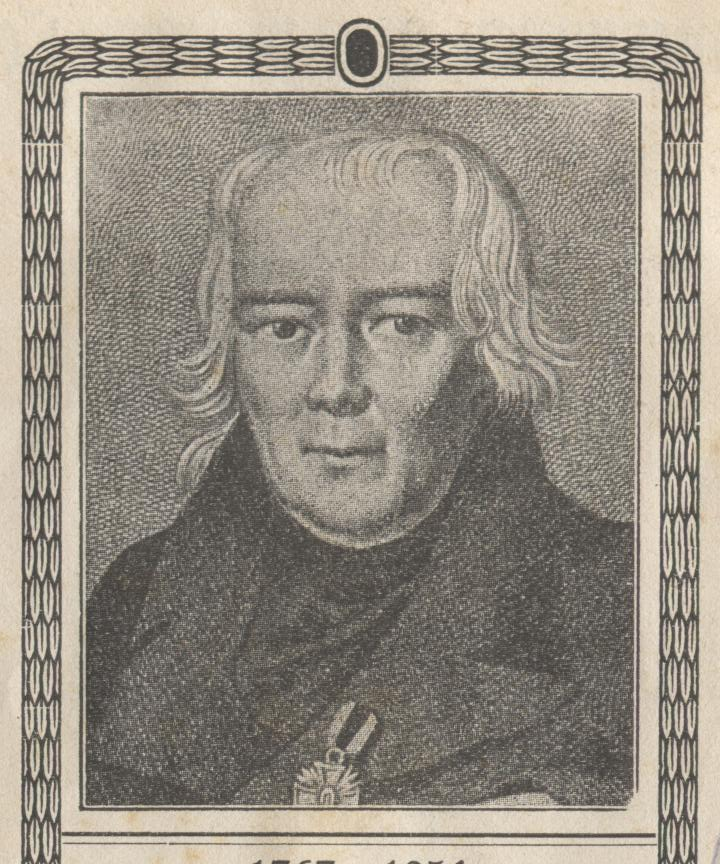 Christoph von Schmid, Priester und Volksschriftsteller.